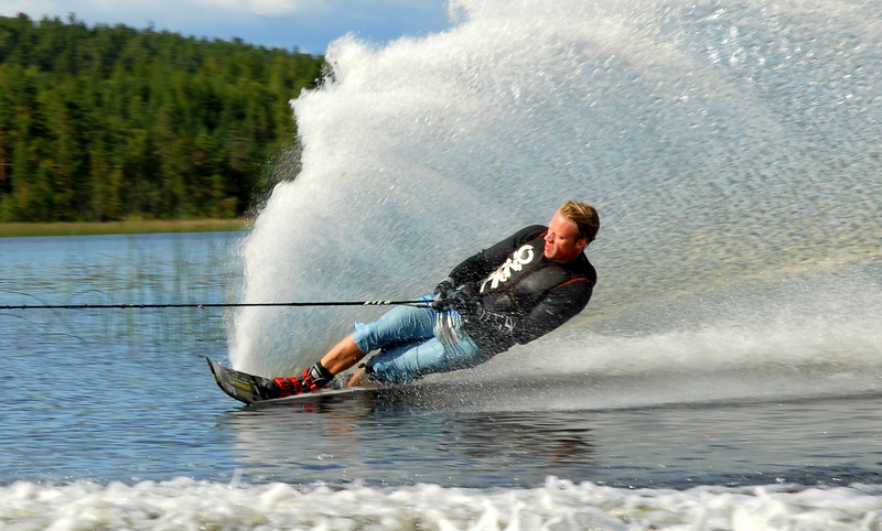 Slalåm på 12meters line